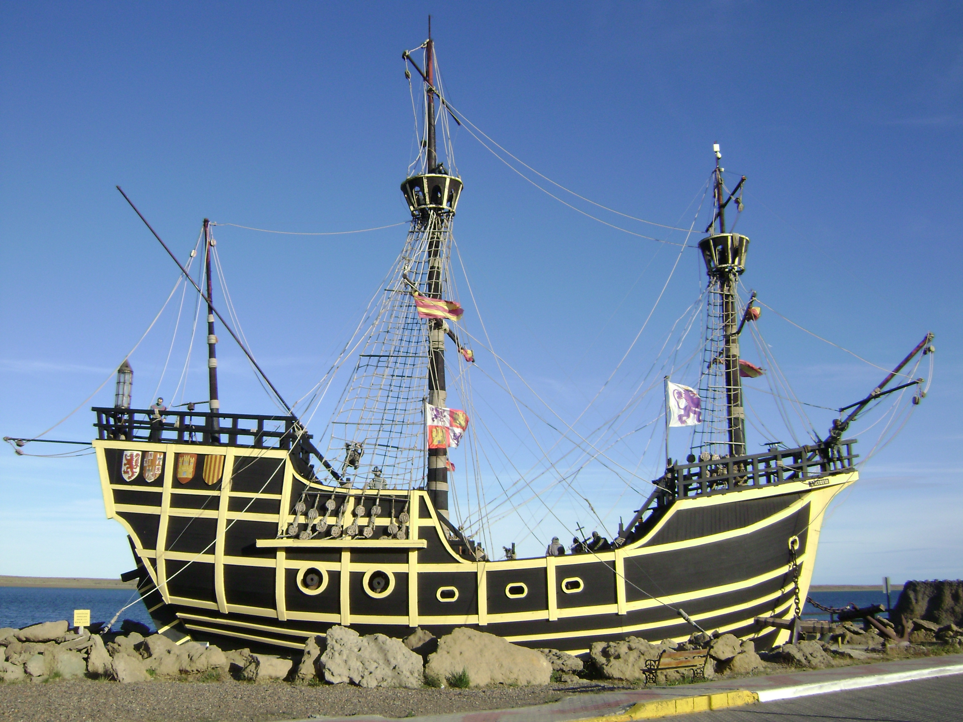 Nao Victoria de la expedición Magallanes-Elcano (1519-1522). Puerto de San Julián. Santa Cruz. Argentina.